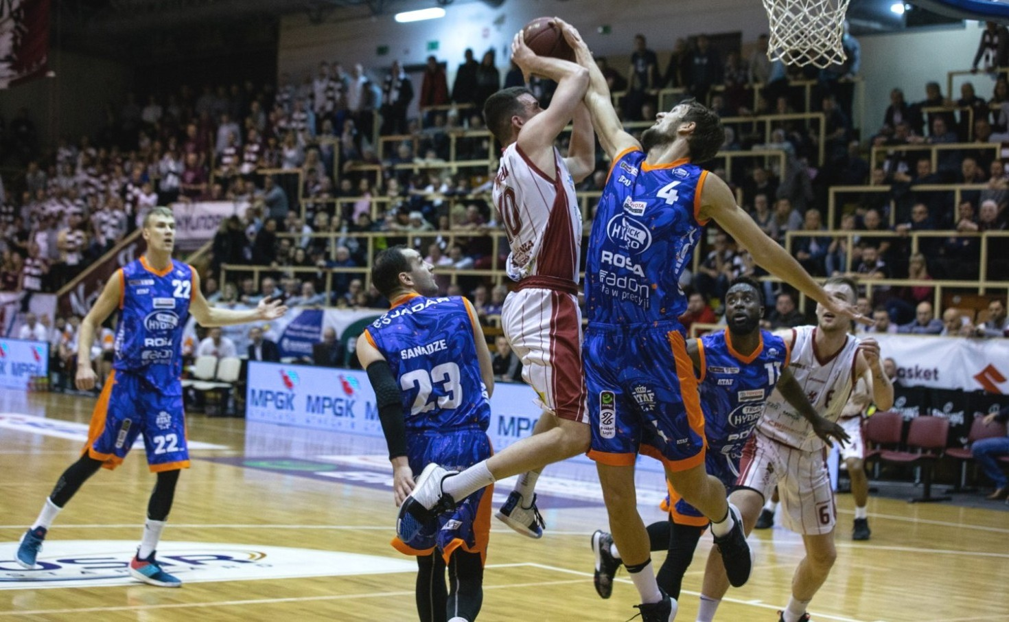 Rosa Radom. Stargard